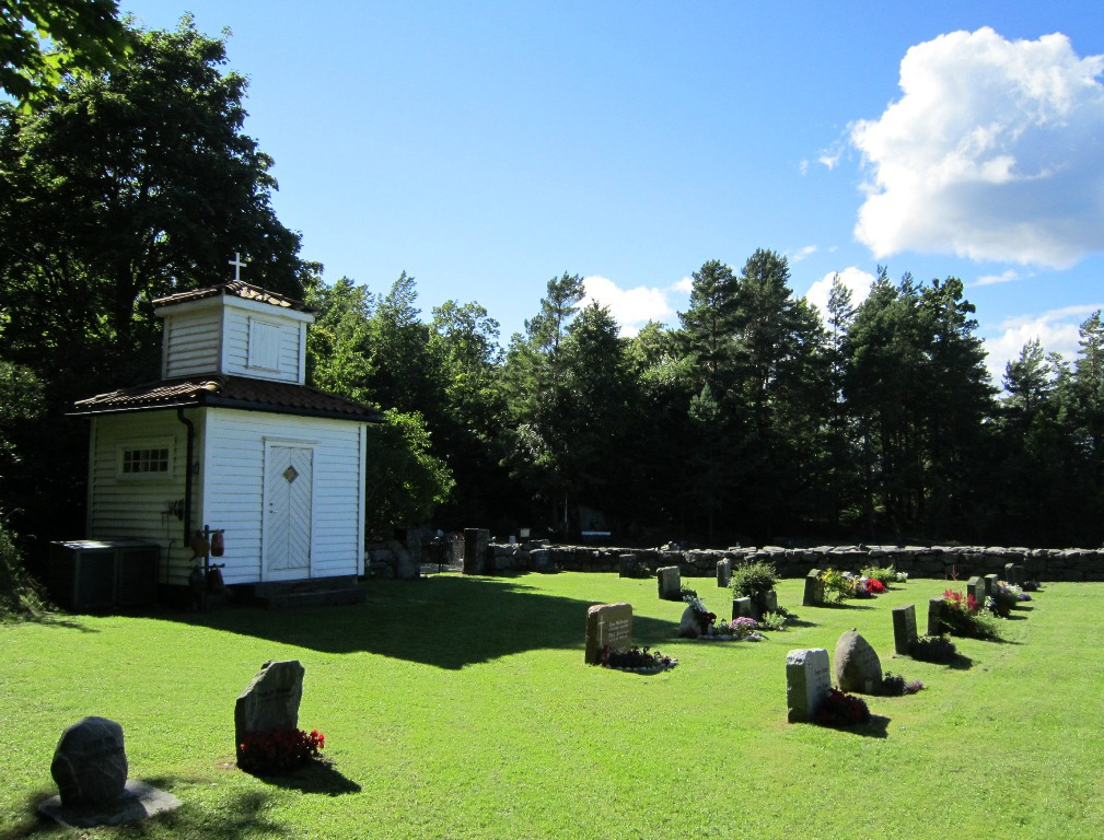 Ospevika kirkegård i Kragerø kommune